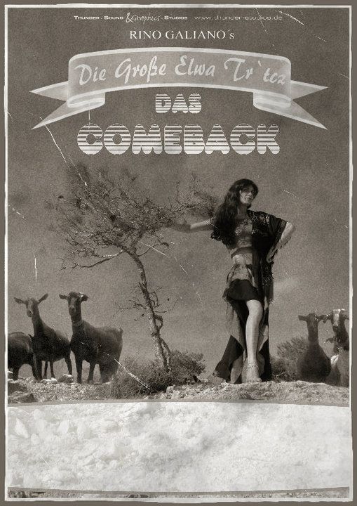 Die große Elwa Tr’tcz – Das Comeback